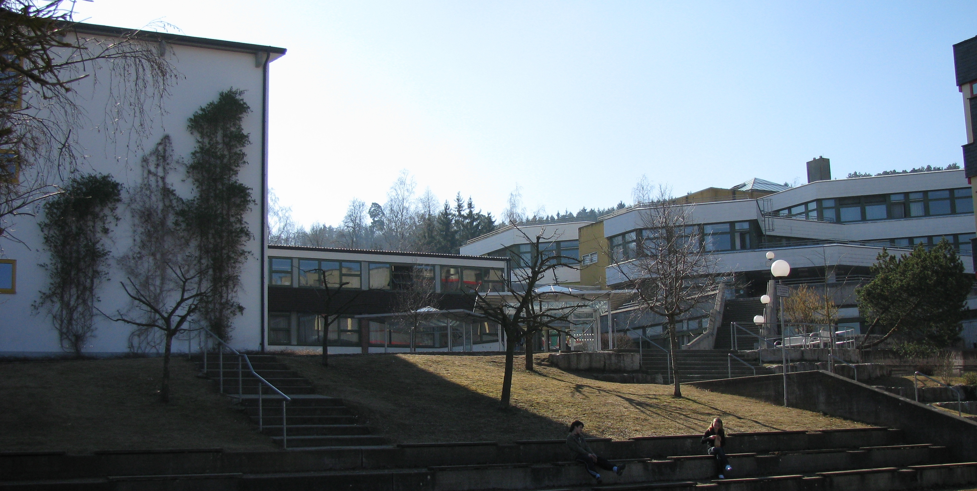 Südansicht Schulzentrum Bopfingen